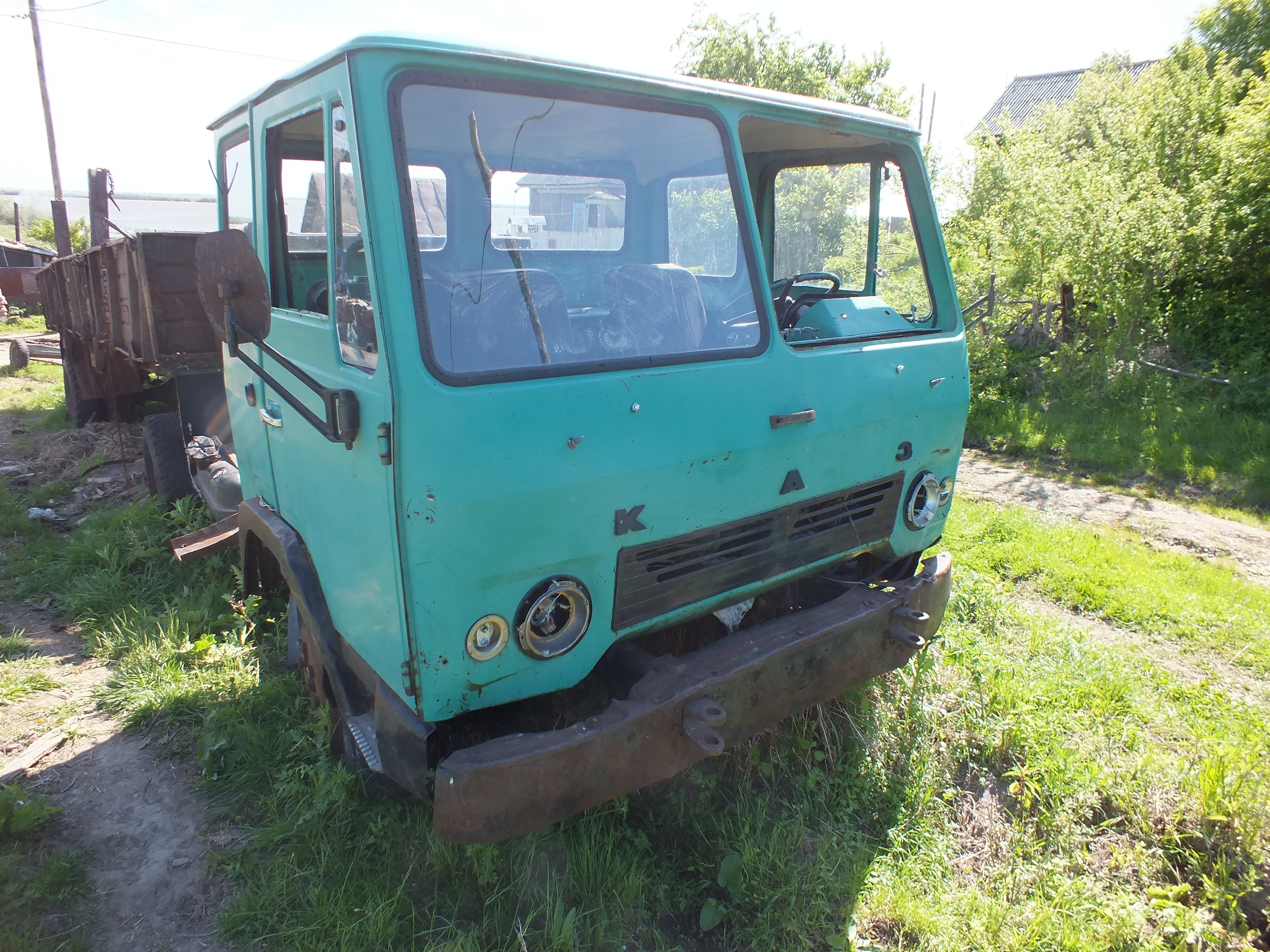 КАЗ-608В Хабаровский край